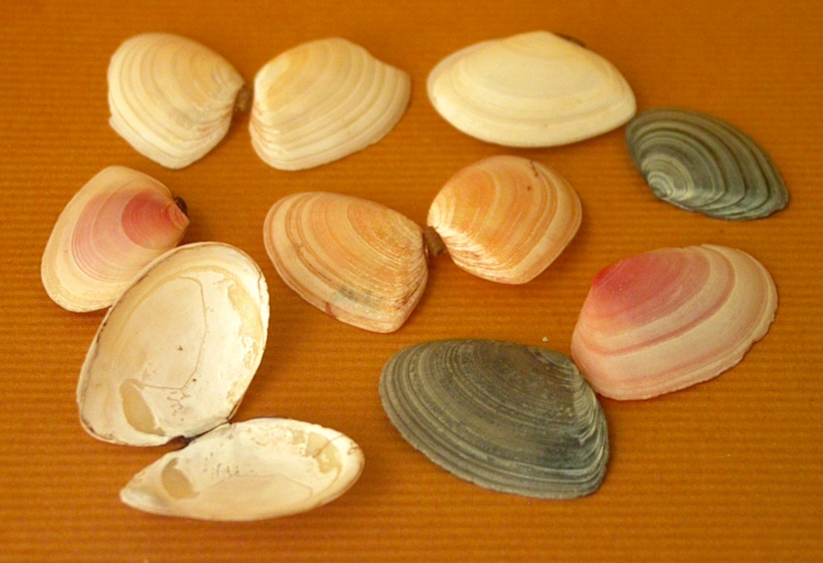 Tere platschelp